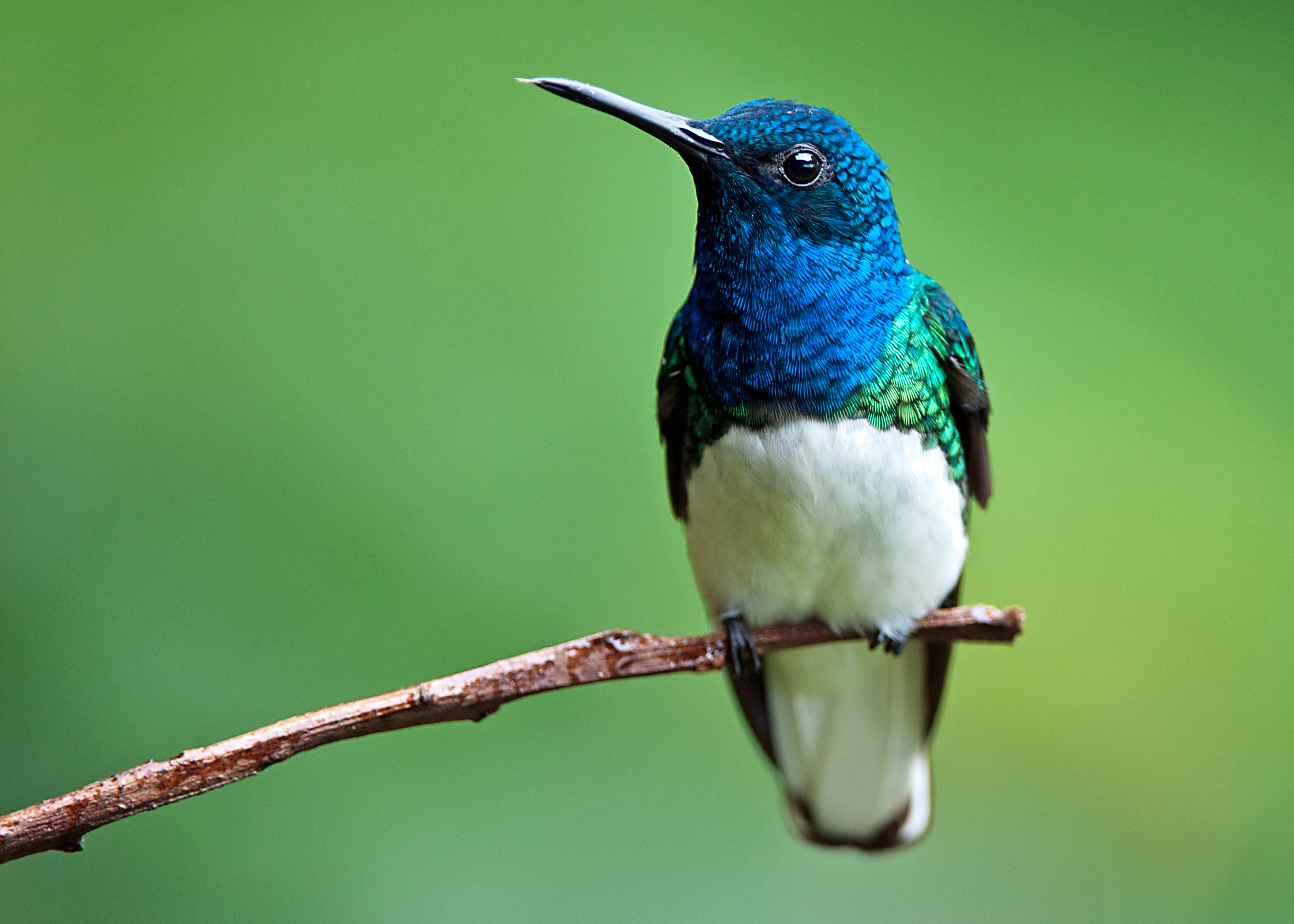 Florisuga mellivora male Rancho Naturalista, Costa Rica